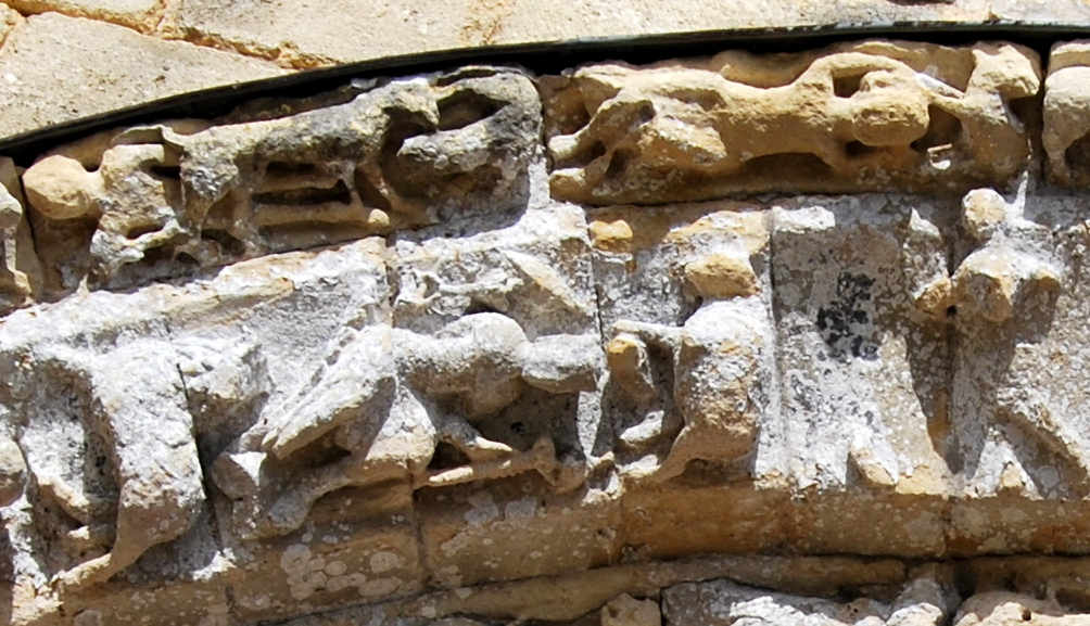 Détails du Zodiaque du Portail